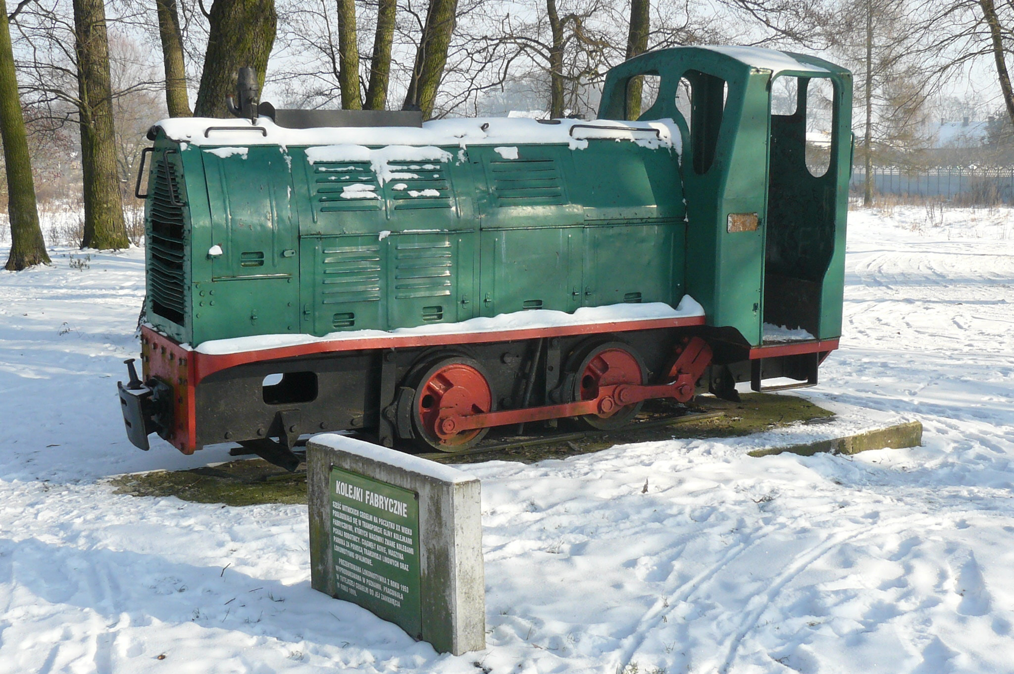 Park Drogowskazów i Słupów Milowych Cywilizacji - Witnica.